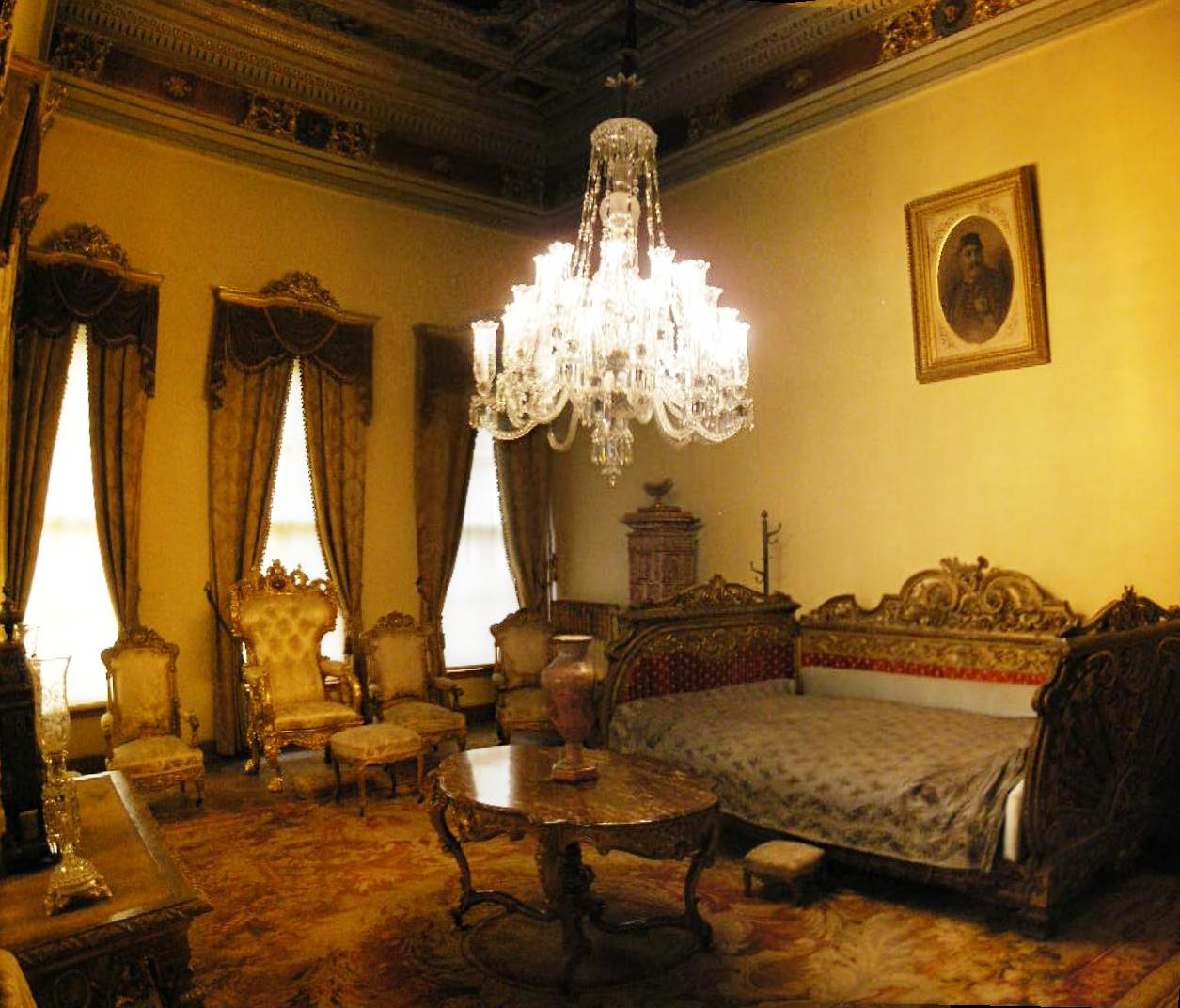 The bedroom of Sultan Abdül Aziz I (Sultan Abdülaziz'in Yatak Odası) in Dolmabahçe Palace. (#10 of the tour).